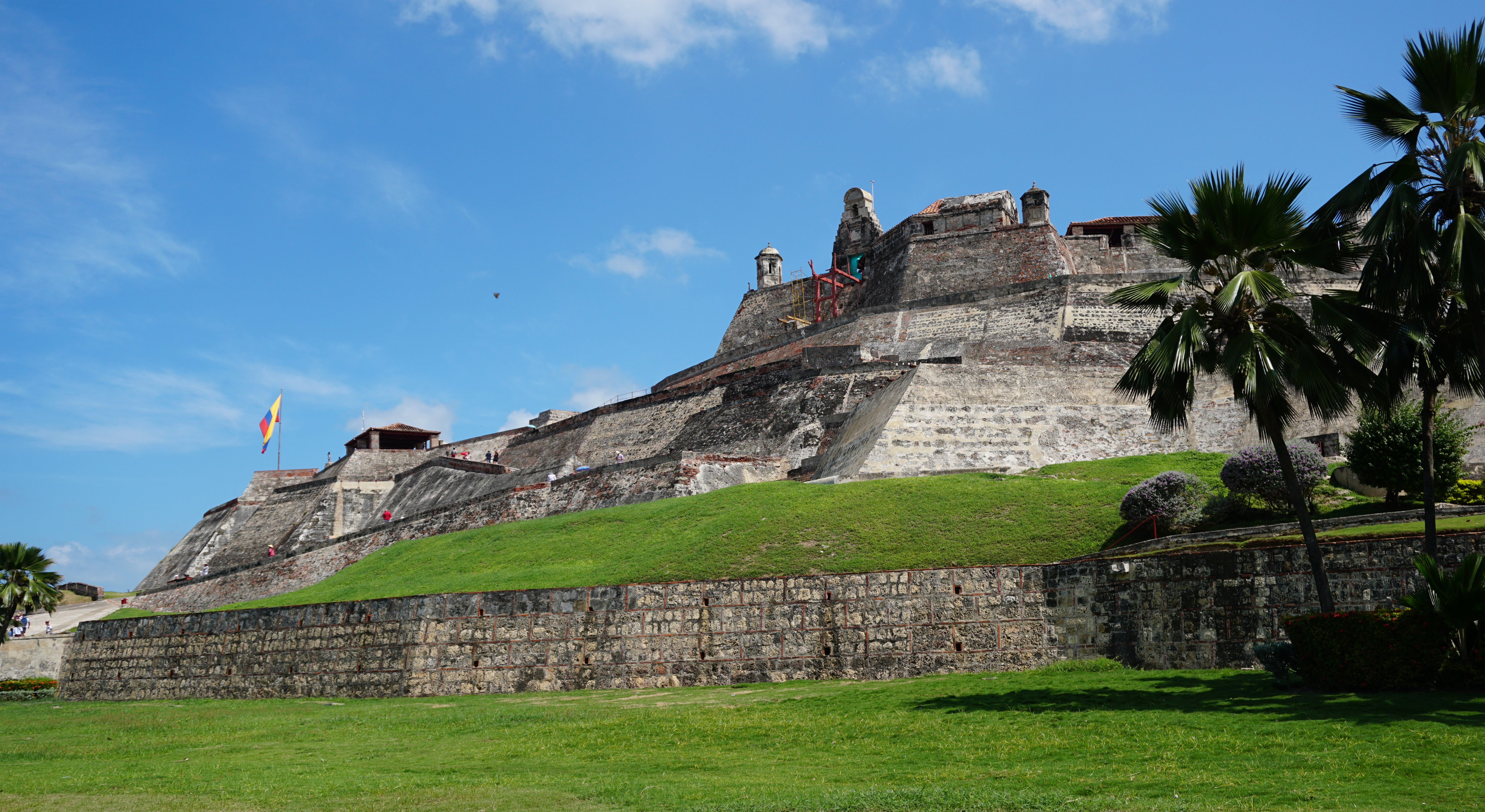 Vista panorámica del Castillo de San Felipe de Barajas, Cartagena de Indias